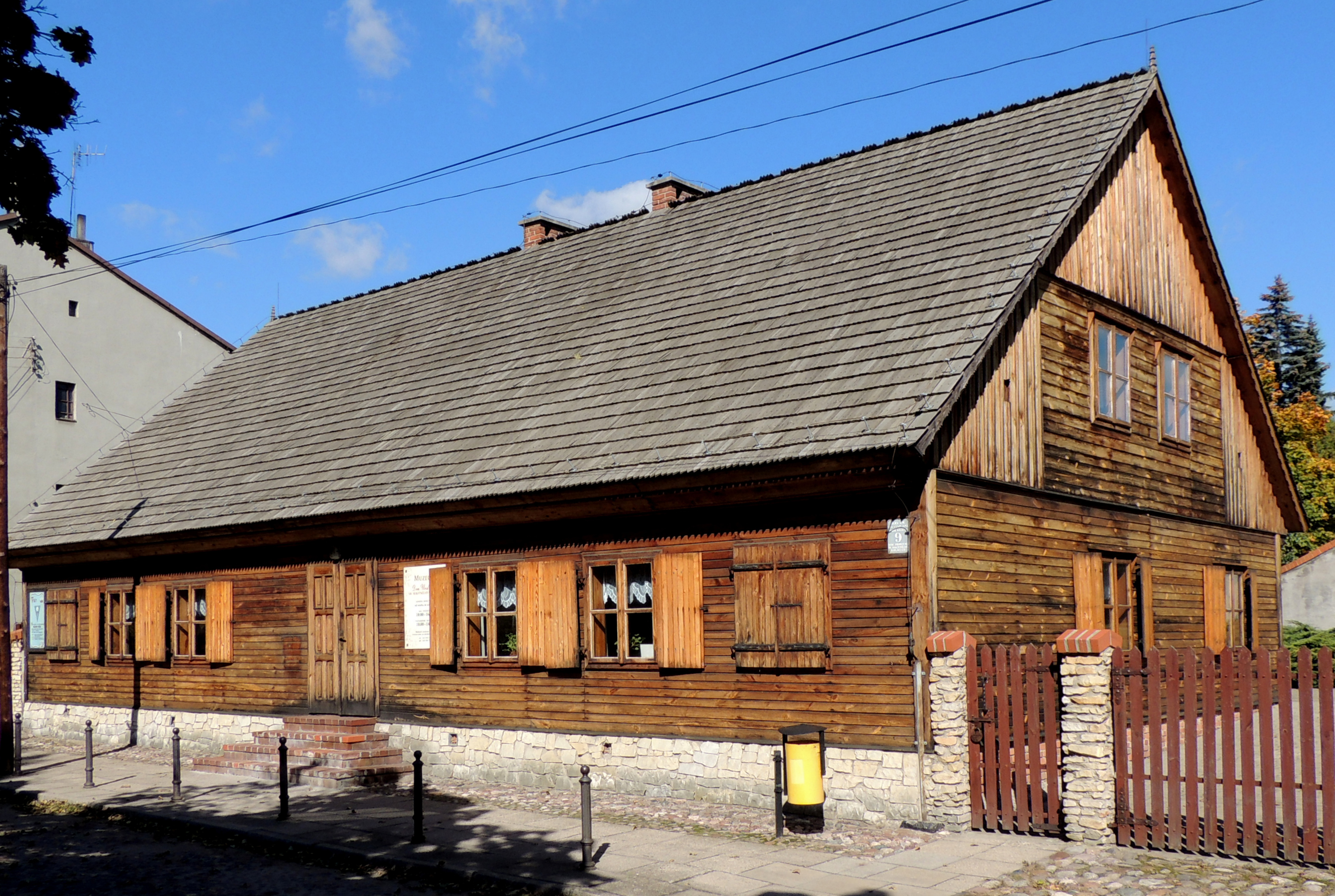 Dom św. Maksymiliana Kolbego (dom tkacki), drewn., XIX w.